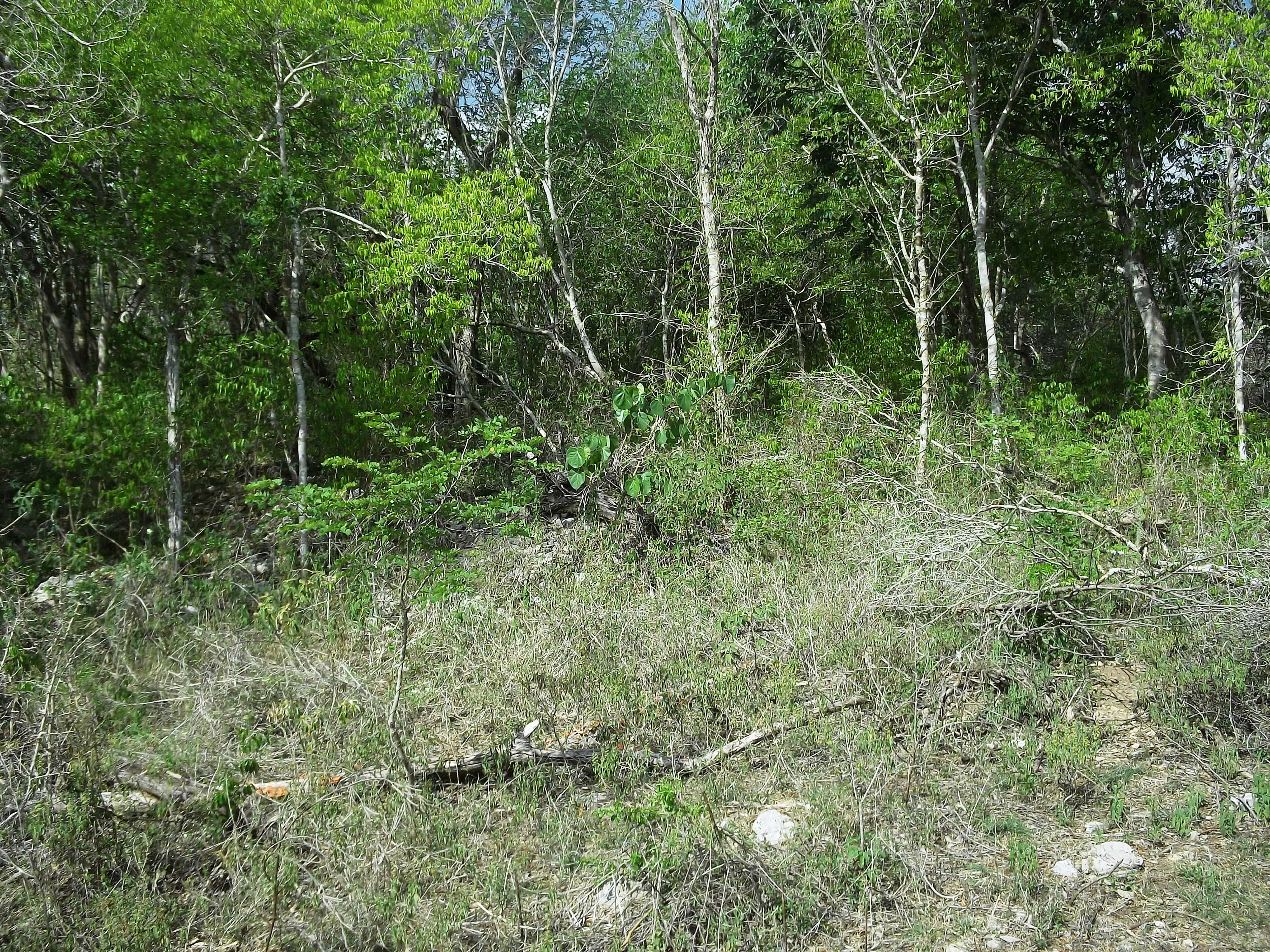 Sitio arquelógico de Xtobó, Yucatán.